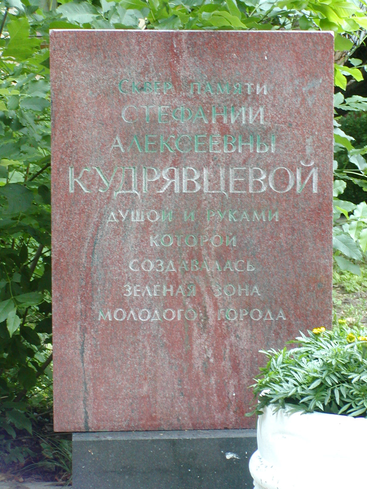 Памятная стела, установленная в сквере имени Стефании Алексеевны Кудрявцевой.